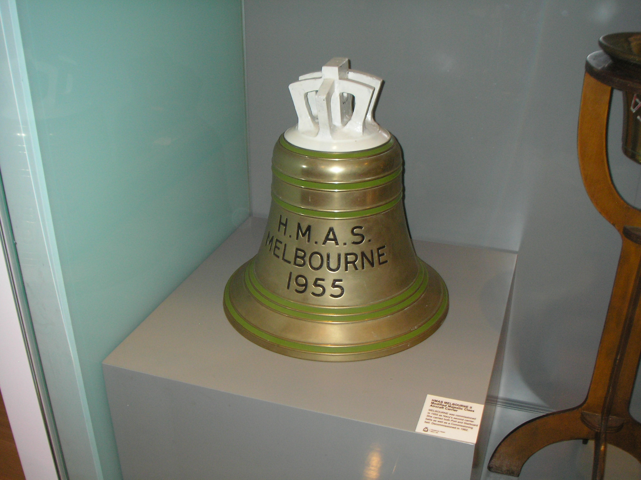 HMAS Melbourne's bell